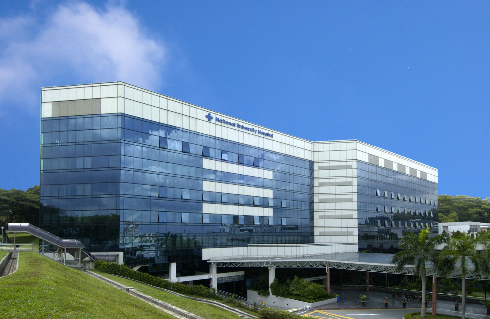 NUH Kent Ridge Wing